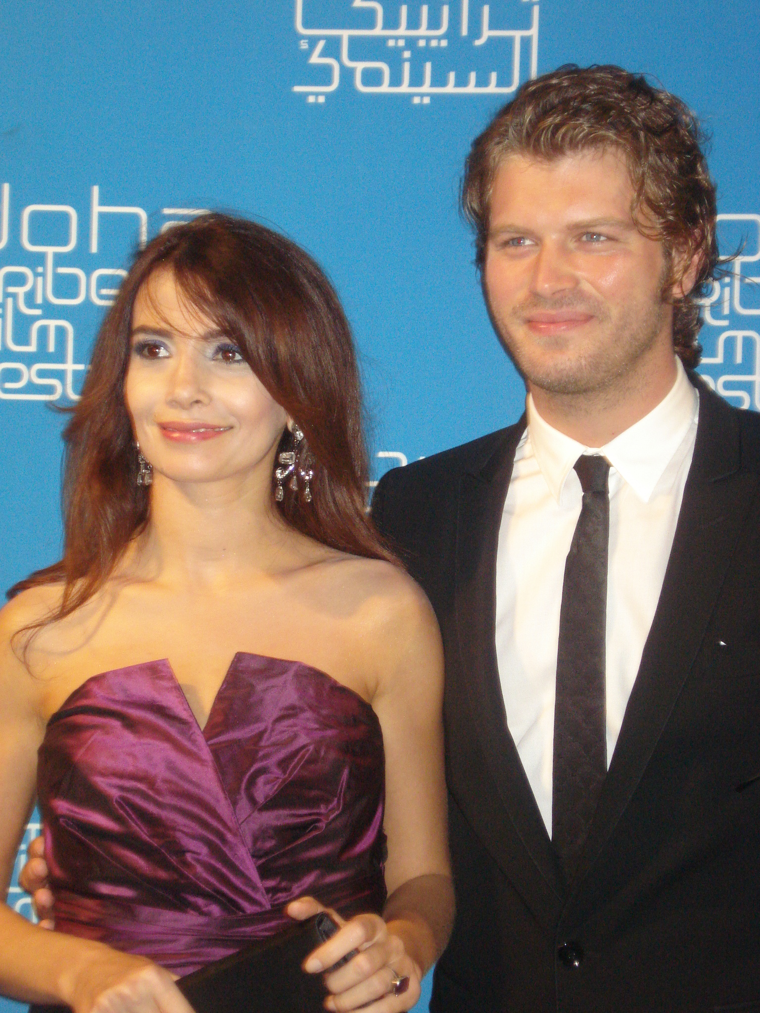 Turkish actors Songül Öden and Kıvanç Tatlıtuğ in Qatar 2009